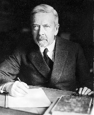 портрет